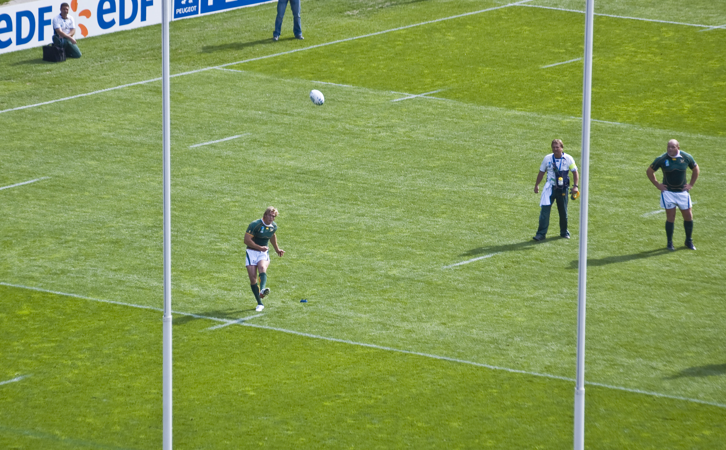 Percy Montgomery teken die eerste punte aan in die Springbokke se Poel A wedstryd teen Samoa by die 2007 Rugby Wêreldbeker.